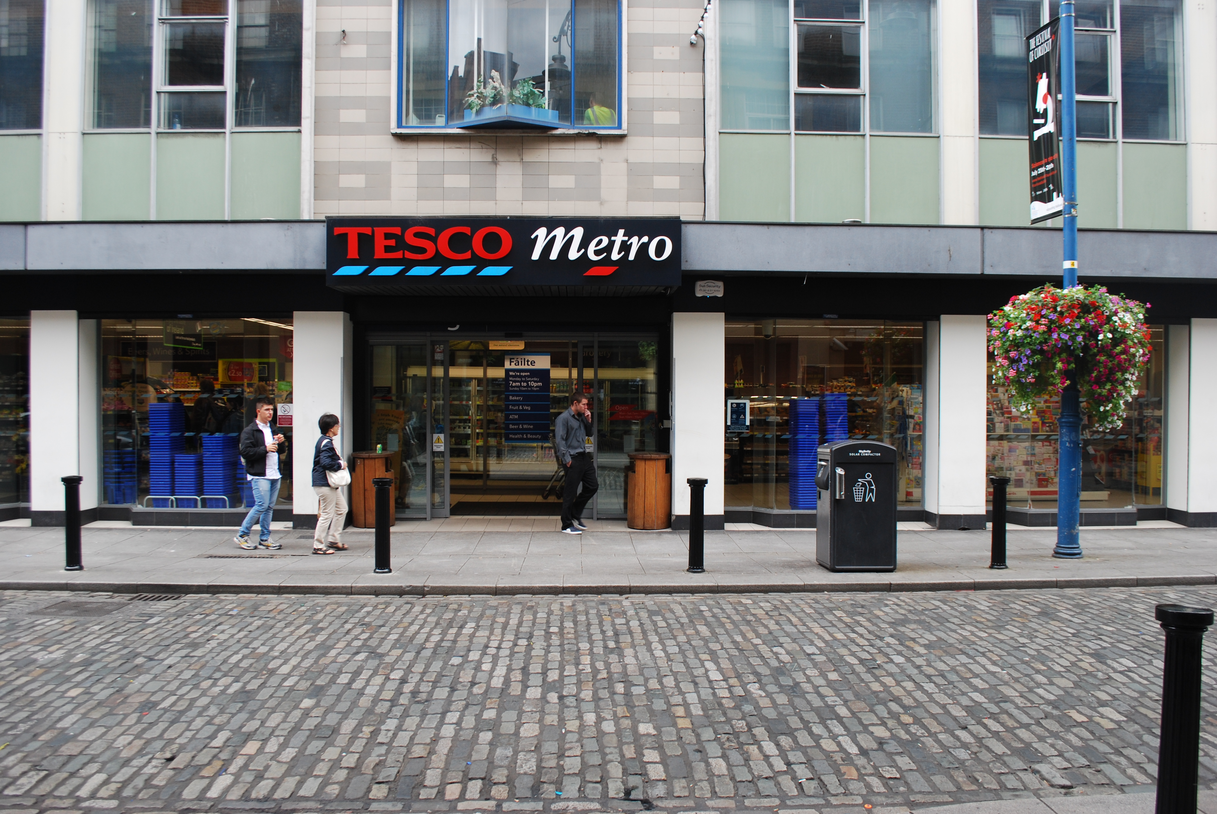 Vue de Fleet Street, à Dublin.